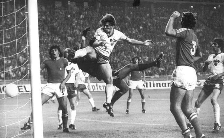 ADN-ZB-Mittelstädt-18.6.74-ma-Westberlin: X. Fußball-Weltmeisterschaft-1. Finalrunde, Gruppe 1: DDR - Chile 1:1- 56. Spielminute: Nach einem Freistoß von Peter Dcuke köpft der 19jährige Martin Hoffmann (Mitte) zum 1:0 ein. Torwart Leopoldo Vallejos (dahinter) kann nicht mehr eingreifen. Links Elias Figueroa, rechts Nr.3 Alberto Quintano (alle Chile). Ganz rechts Harald Irmscher (DDR).